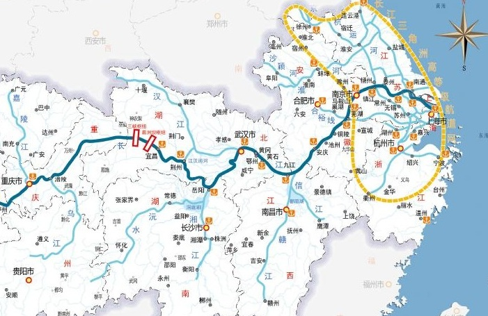 长江中下游平原平面图